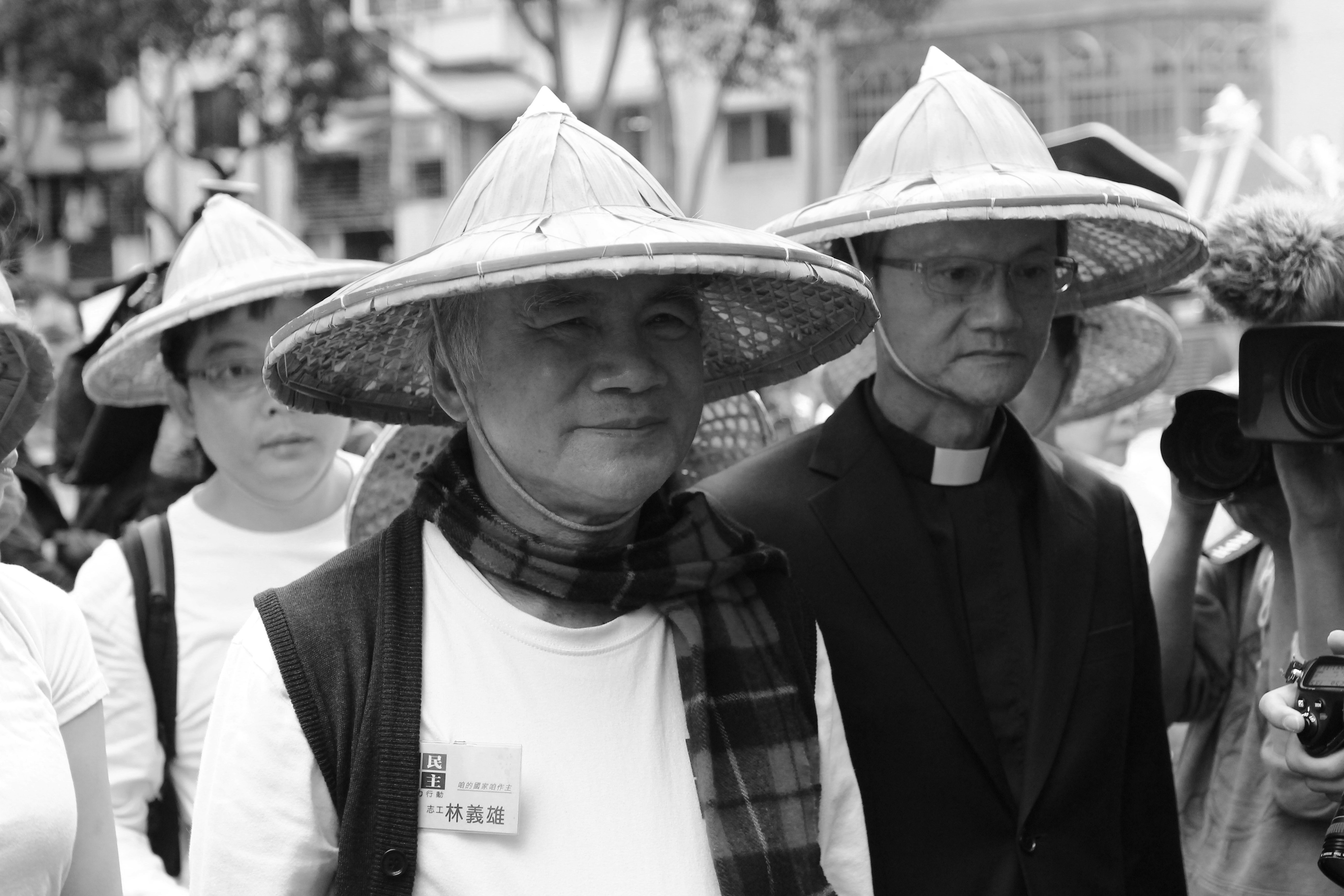 Since 2014/4/22 @ 臺北義光教會